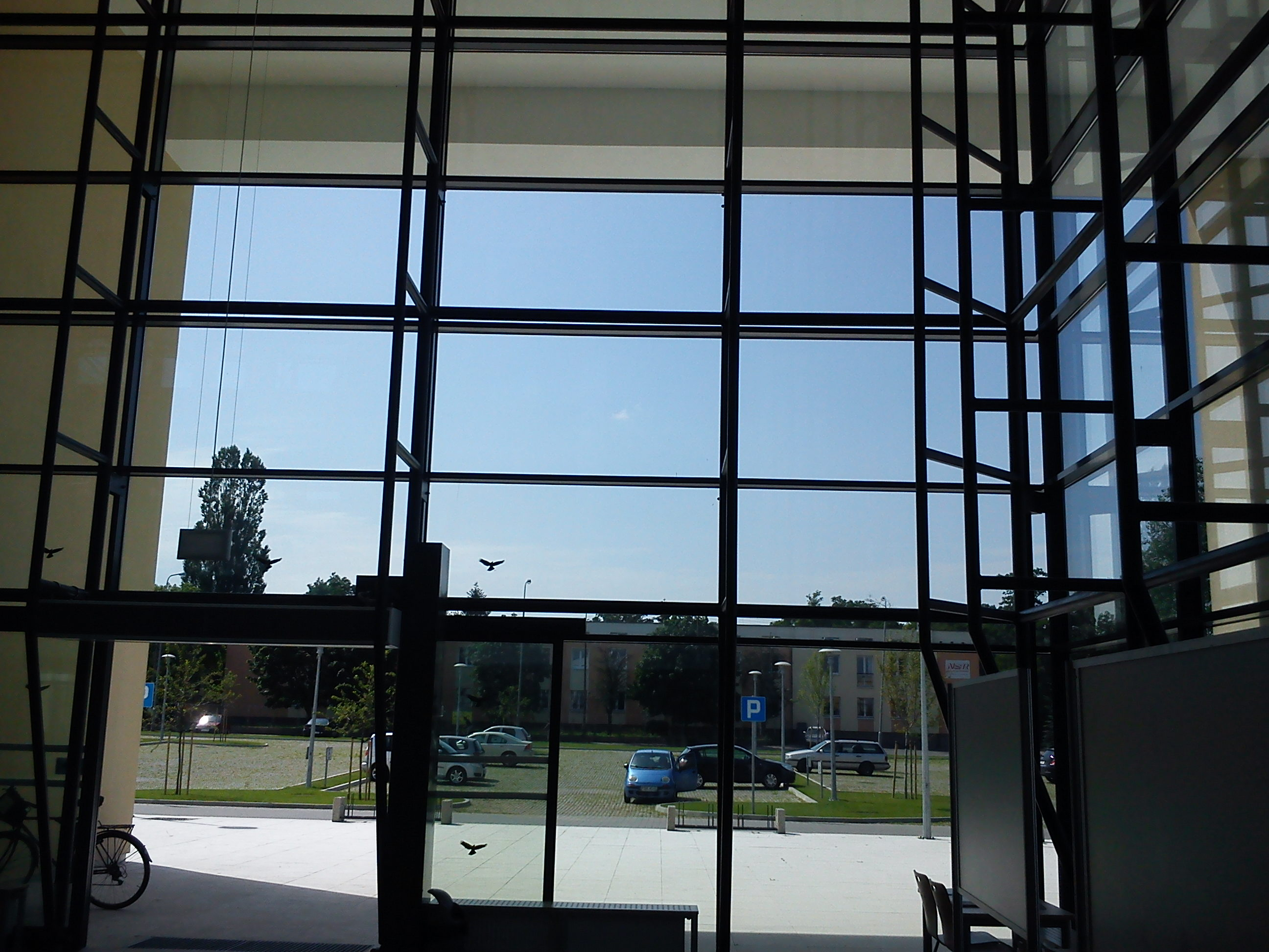 Biocentrum Uniwersytetu Przyrodniczego, Poznań, ul. Dojazd.